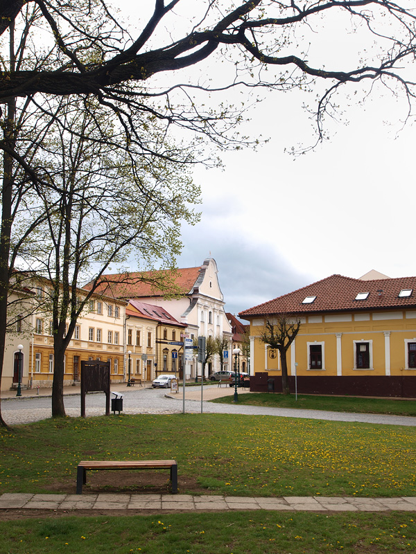 Kežmarok - Hradné námestie a Mariánsky kostol